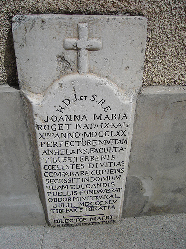 stele bozel